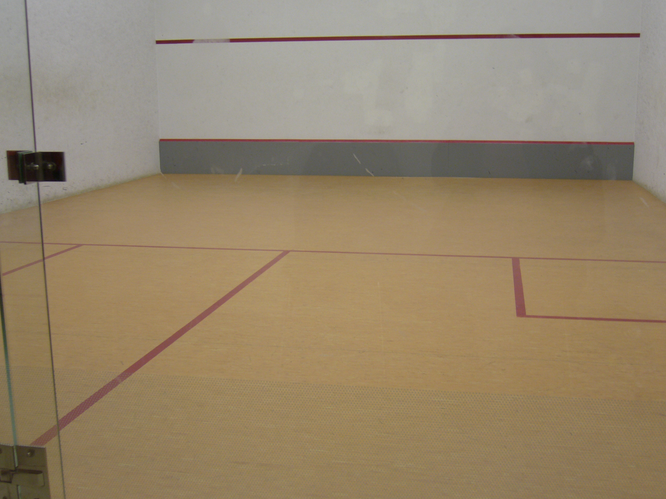 Fallabdapálya